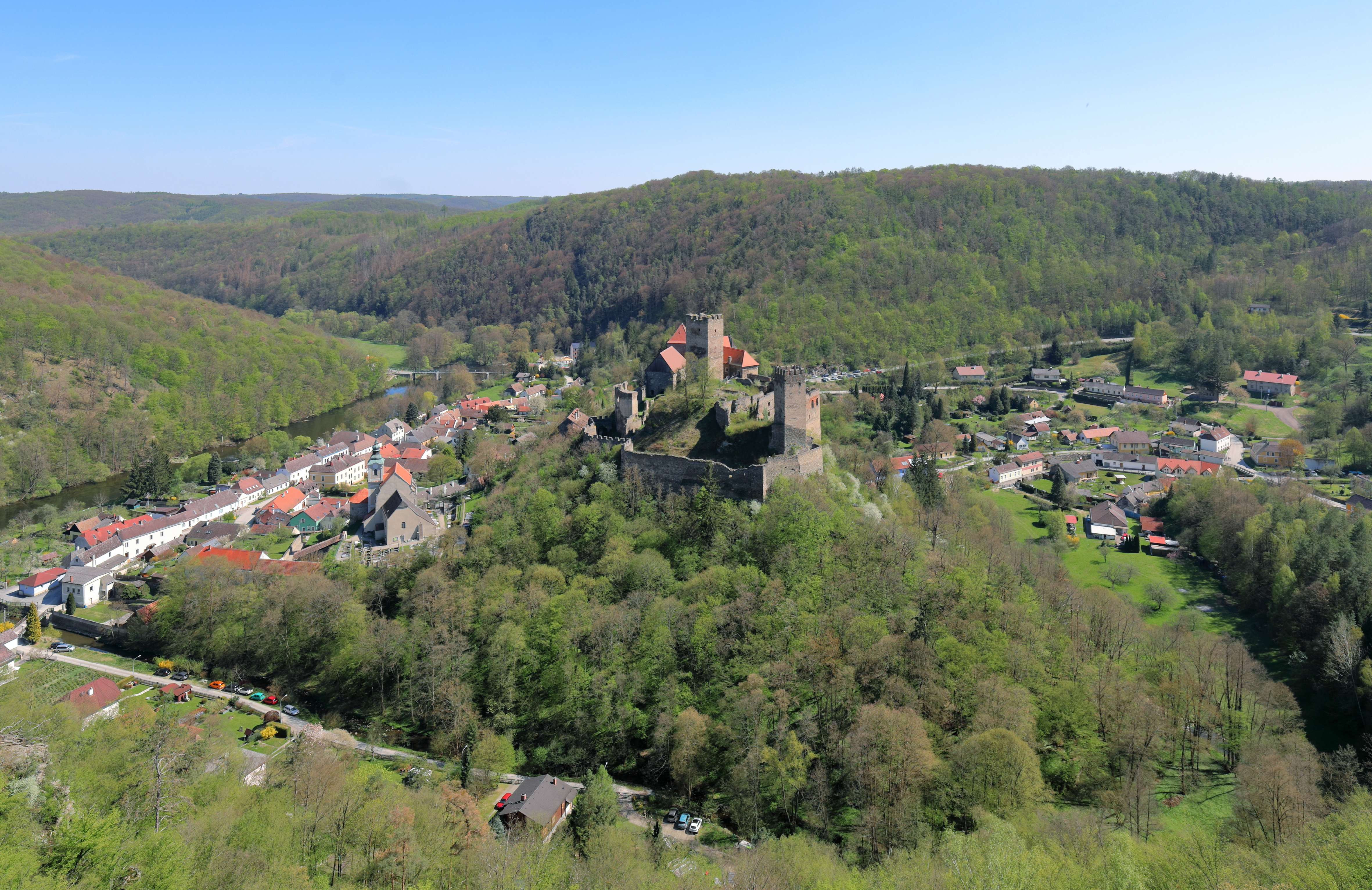 Nordwestansicht der niederösterreichischen Stadt Hardegg. Im Bildzentrum auf einem Felskegel die Burg Hardegg und ganz links die Thaya.